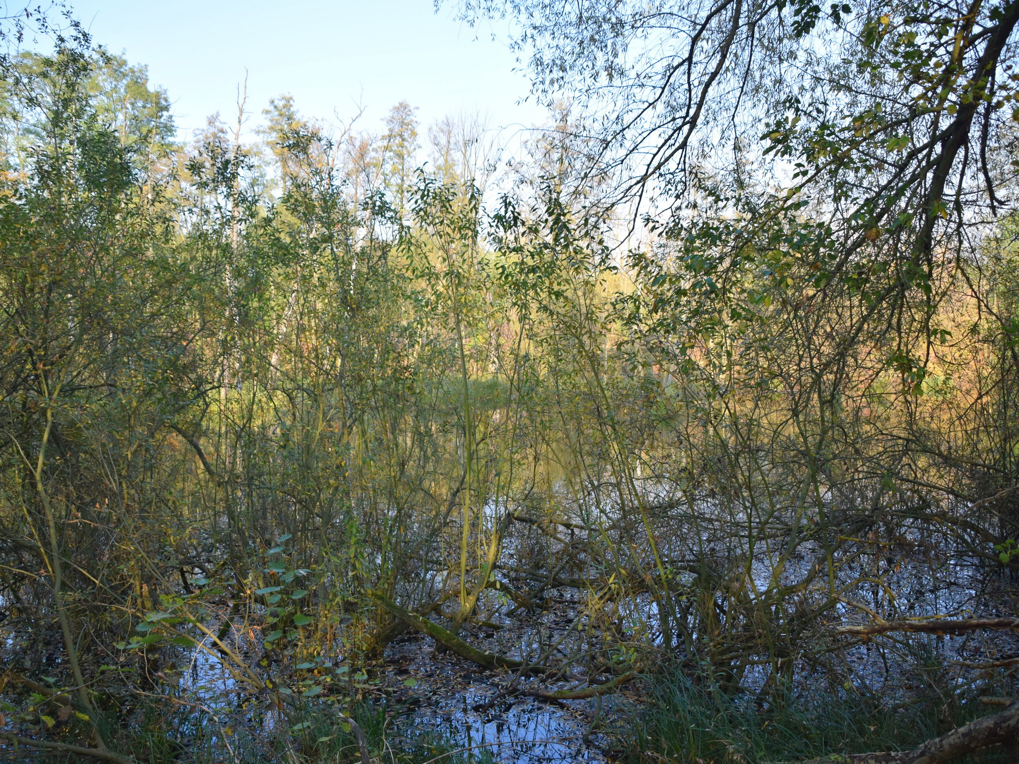 Krügerteich in Frankfurt (Oder)